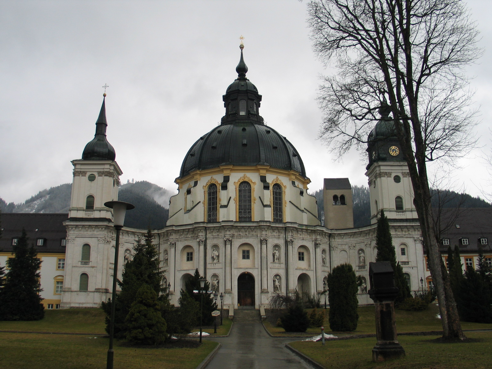 de abdij van Ettal in Ettal, Beieren